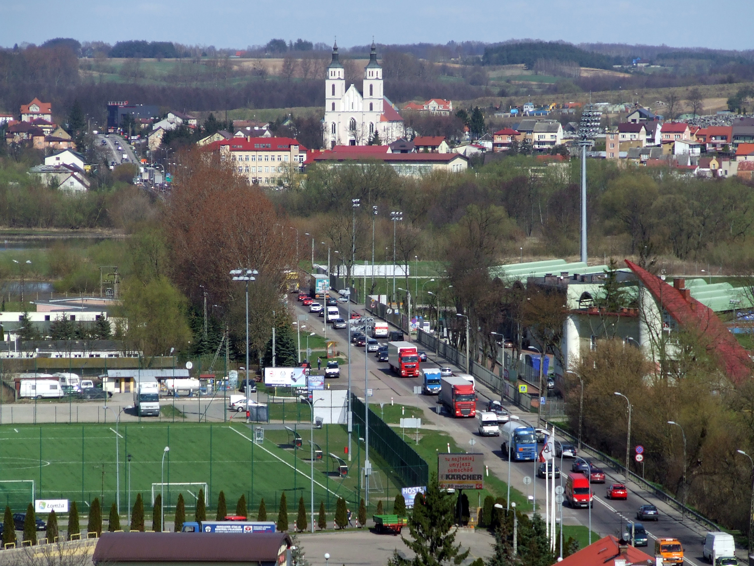 Widok z hotelu Gromada na drogę łączącą Łomżę z Piątnicą